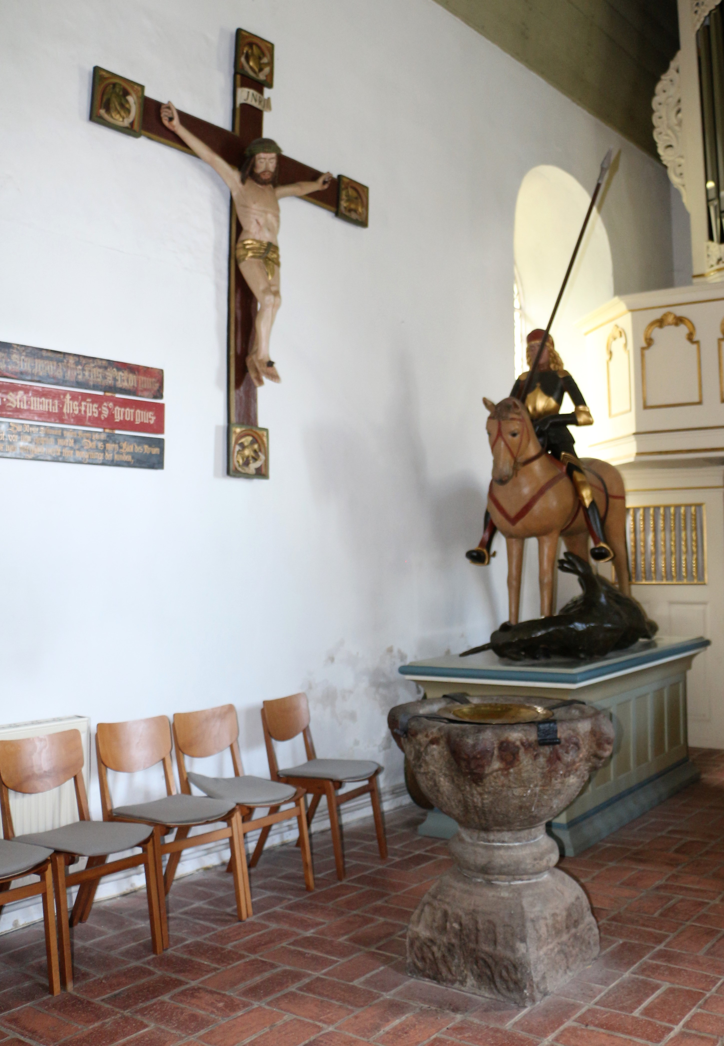 Triumphkreuz (16. Jh.), St.-Jürgen-Gruppe (~1500) und Granittaufe (13. Jh.) der Wilhadikirche Ulsnis